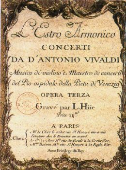 Original Score